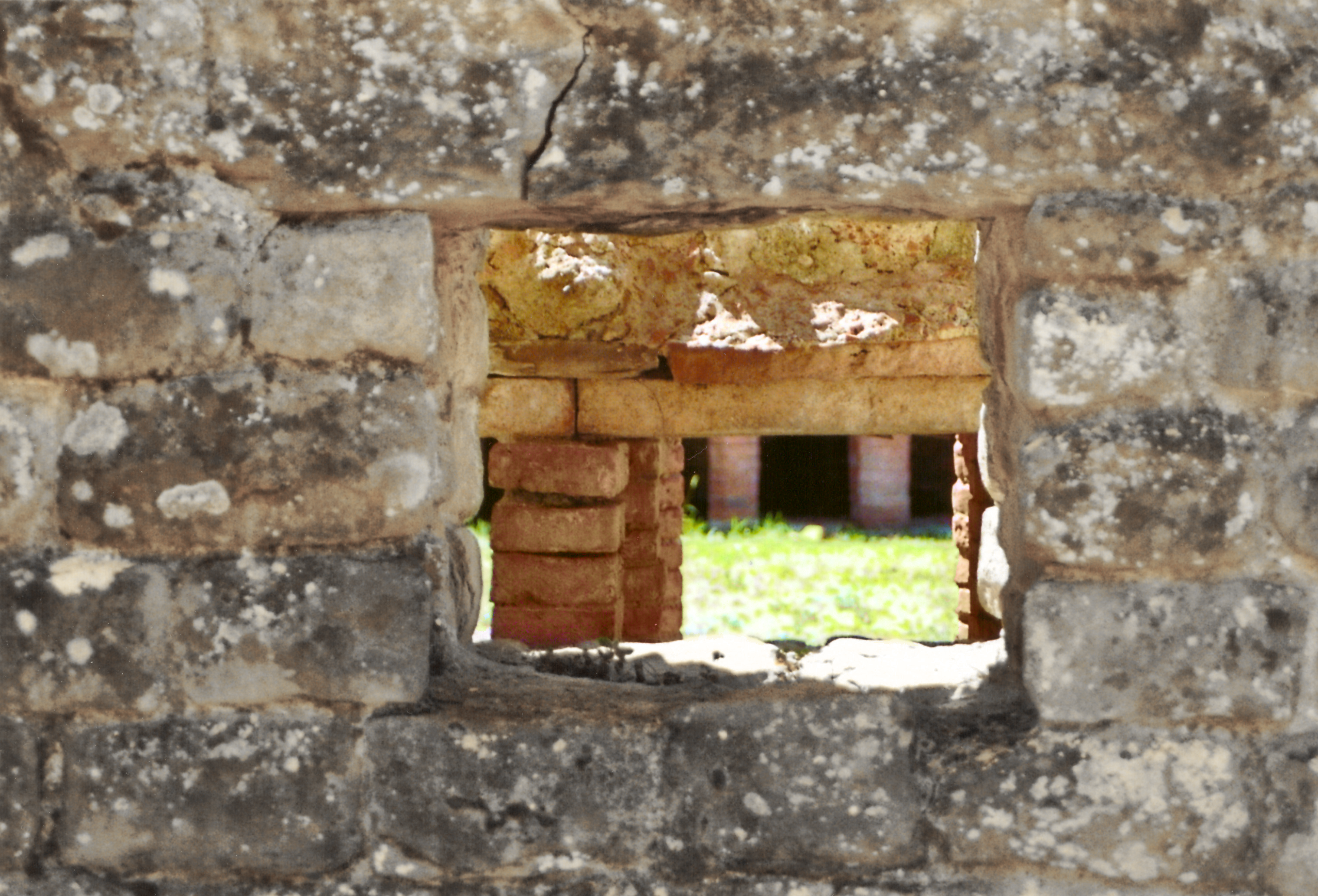 Fiesole (Toskana, Italien) - Archäologische Zone - Thermen. Blick durch eine der beiden erhaltenen kleinen Wandöffnungen im Bereich der Suspensura, durch die Heißluft vom Caldarium ins Tepidarium strömte.